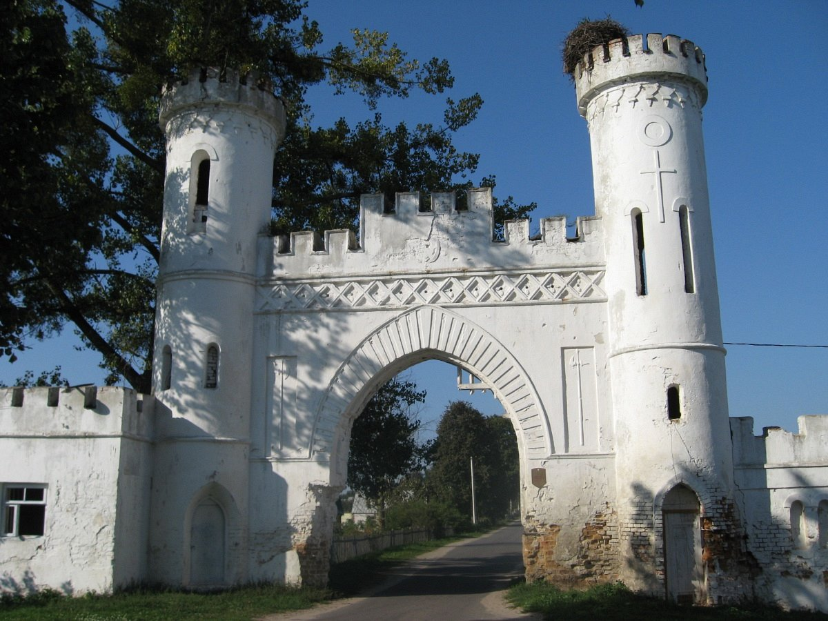 Пескі. Паўночная брама